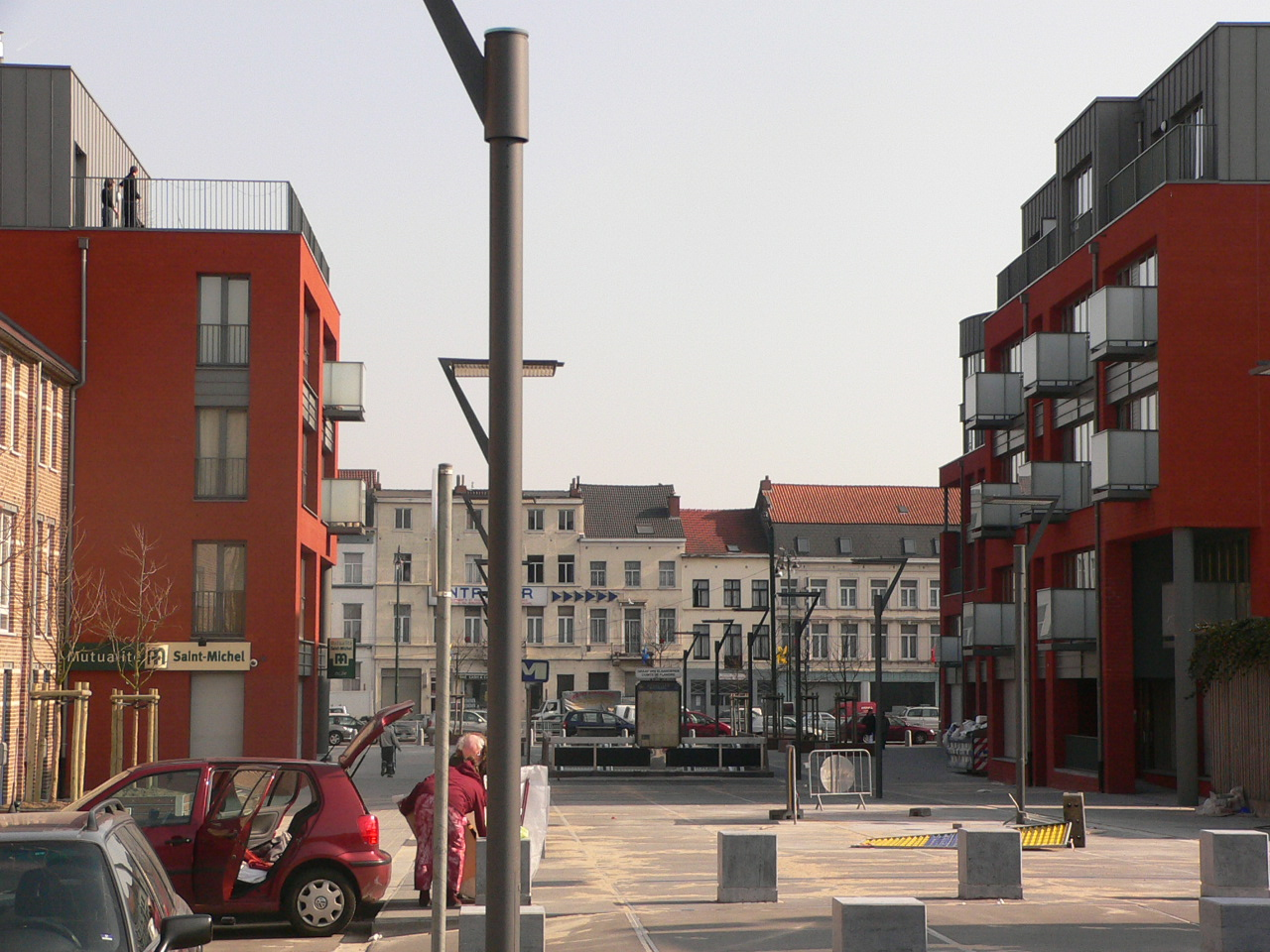 Molenbeek (Barrio Rive Gauche), fotografia de Mario Scolas.